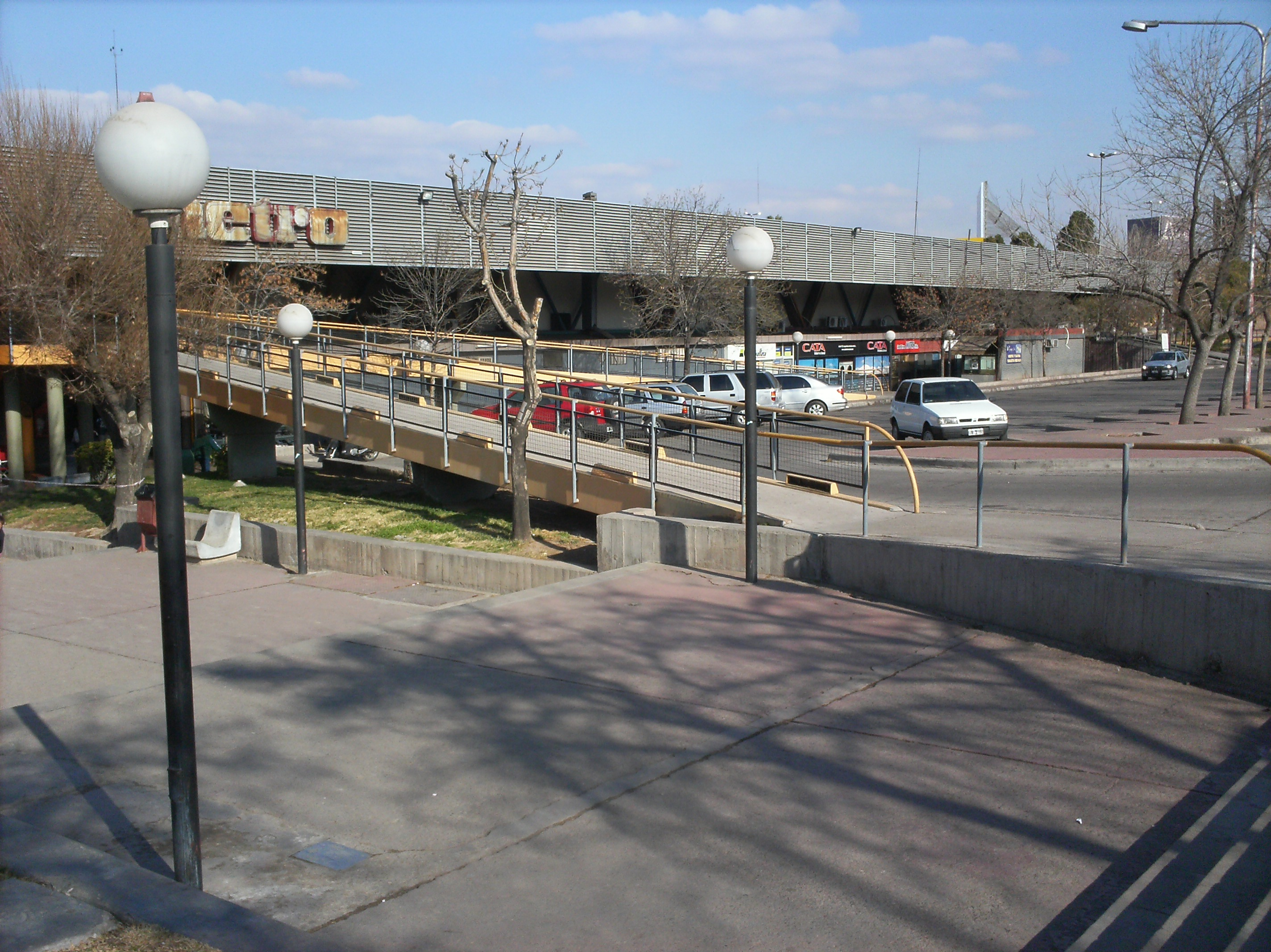 la terminal internacional de omnibus de la ciudad